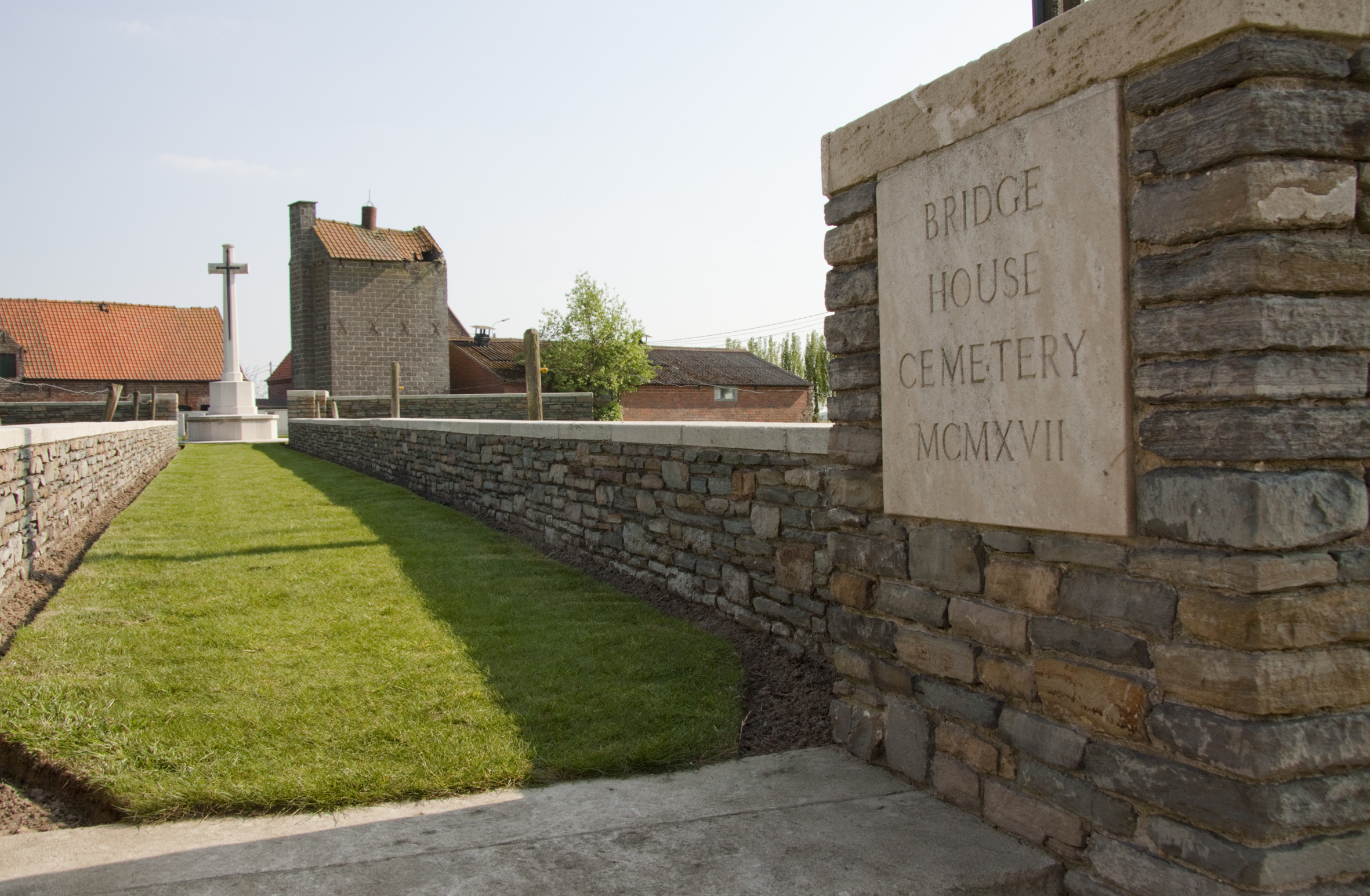 Bridge House Cemetery. Toegang tot de begraafplaats.